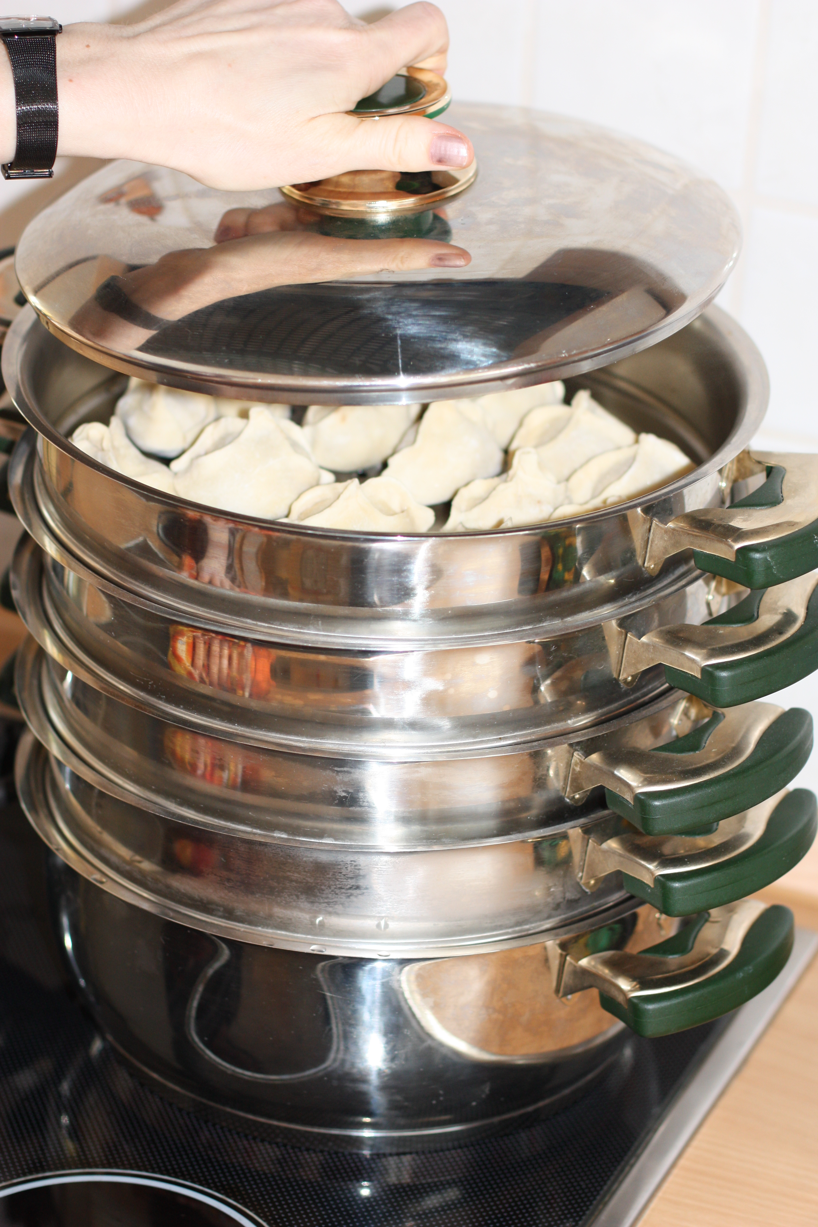 Manti, hausgemacht, eingefrohren, im speziellen mehrstöckigen Dampftopf, Manti-Topf, mit scharfer roter Soße